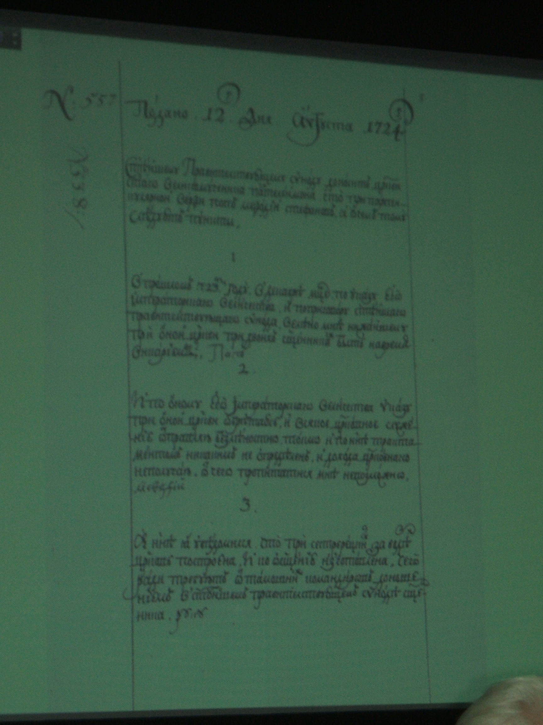 Сестрорецк СПб. Прошение на строительство церкви.